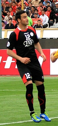 Éamon Zayed (left)